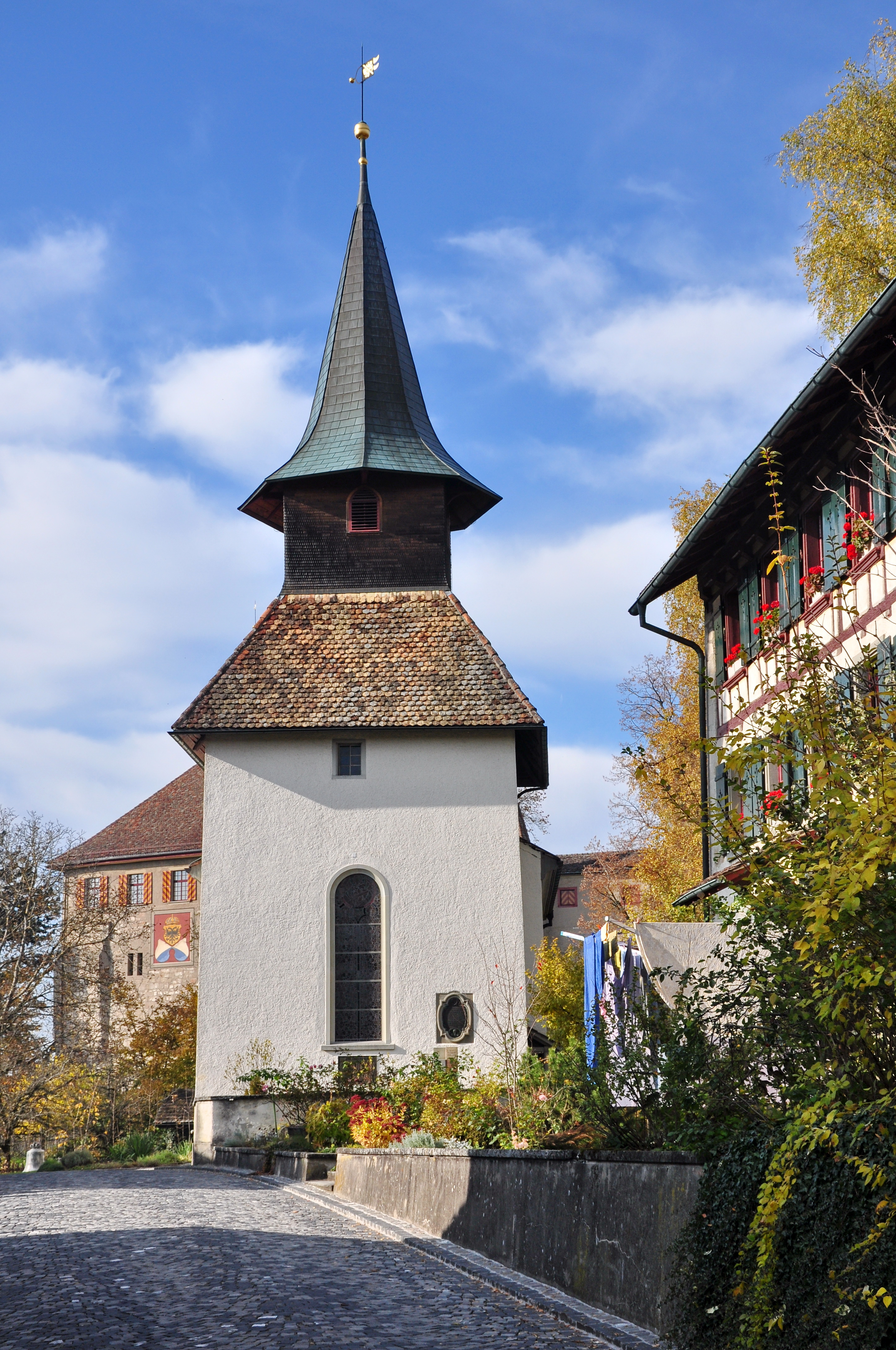 Kirche in Kyburg (Switzerland)